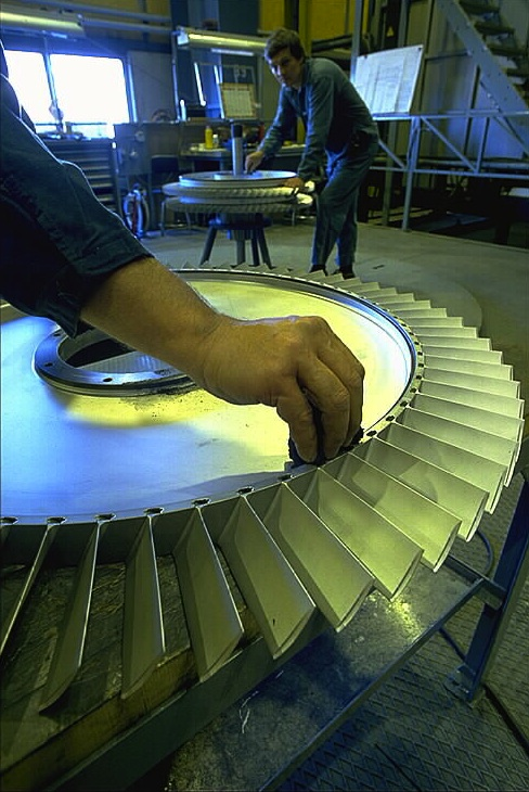 Turbintillverkning, montering av turbinblad. Bilden troligen från början av 1980-talet.